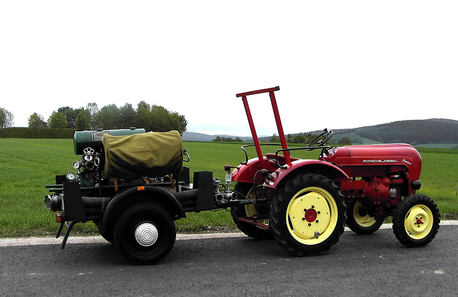 Schlepper Porsche-Diesel Junior (Baujahr 1959, 14 PS) mit Feuerwehranhänger TS4 (Baujahr 1935) in der grünen Farbe der Feuerschutzpolizei. Die TS 4 der Firma Karl Metz aus dem Jahr 1938 war ursprünglich während des Zweiten Weltkrieges im Flugzeugausbesserungswerk Basser am Flugplatz des sächsischen Zwickaus stationiert.